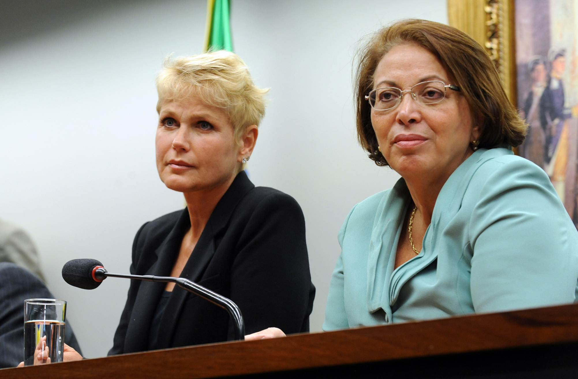 Apresentadora Xuxa Meneghel e ministra da Secretaria de Direitos Humanos da Presidência da República, Ideli Salvatti.